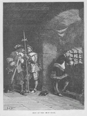 Muž se železnou maskou